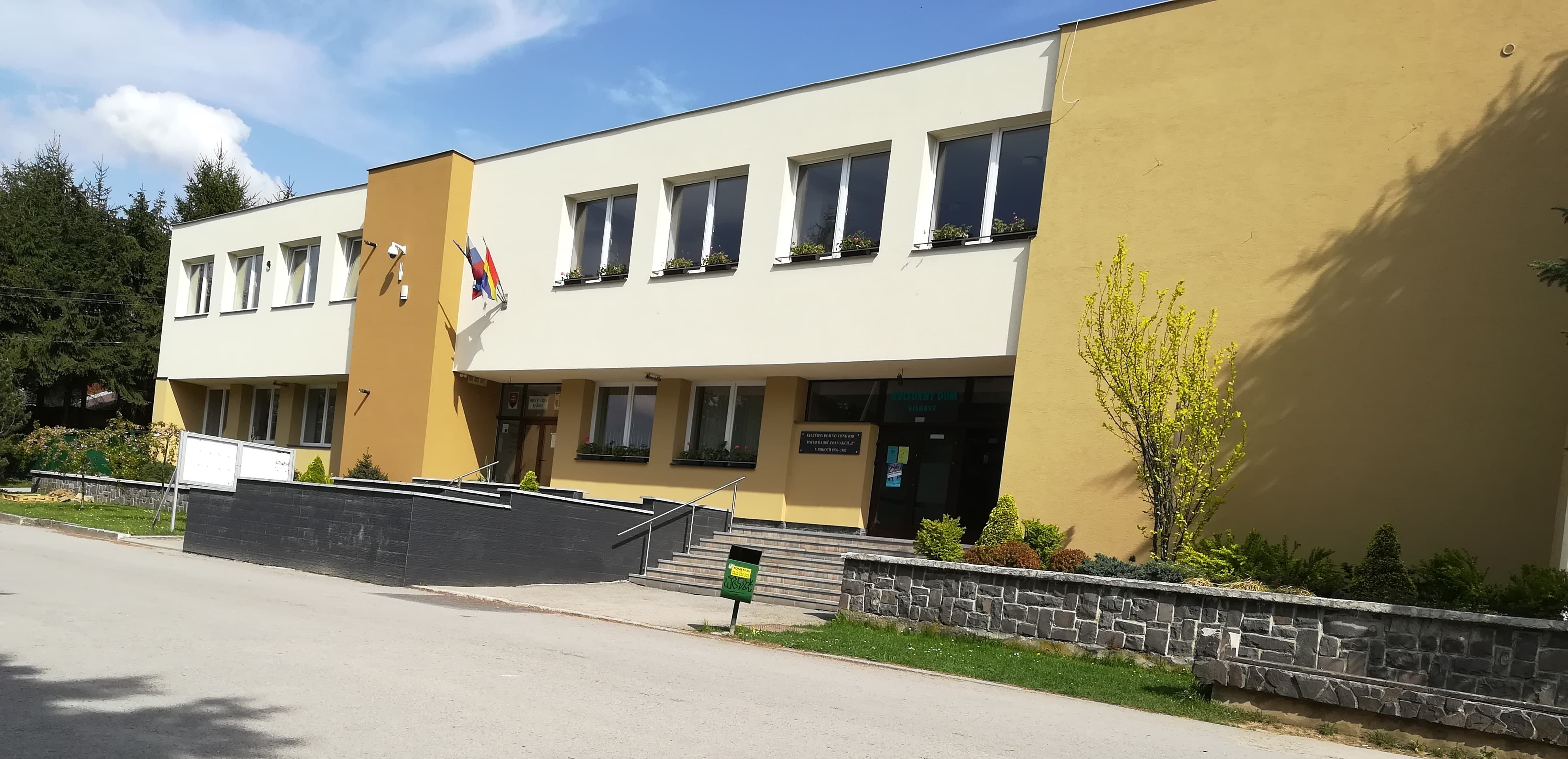 Kultúrny dom a obecný úrad Višňové